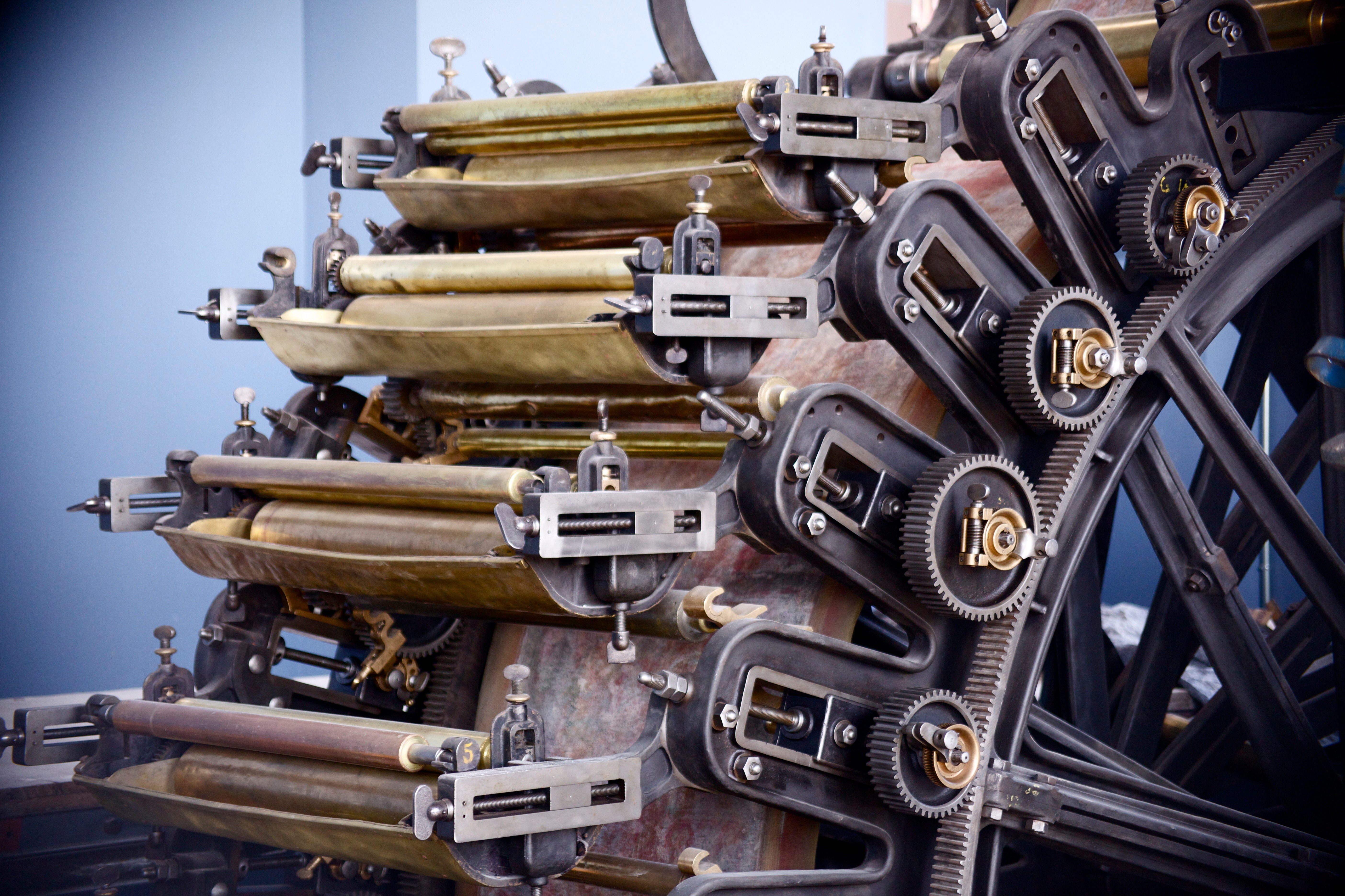 La machine aux 26 couleurs de Saint-Fargeau-Ponthierry : vue de trois-quarts